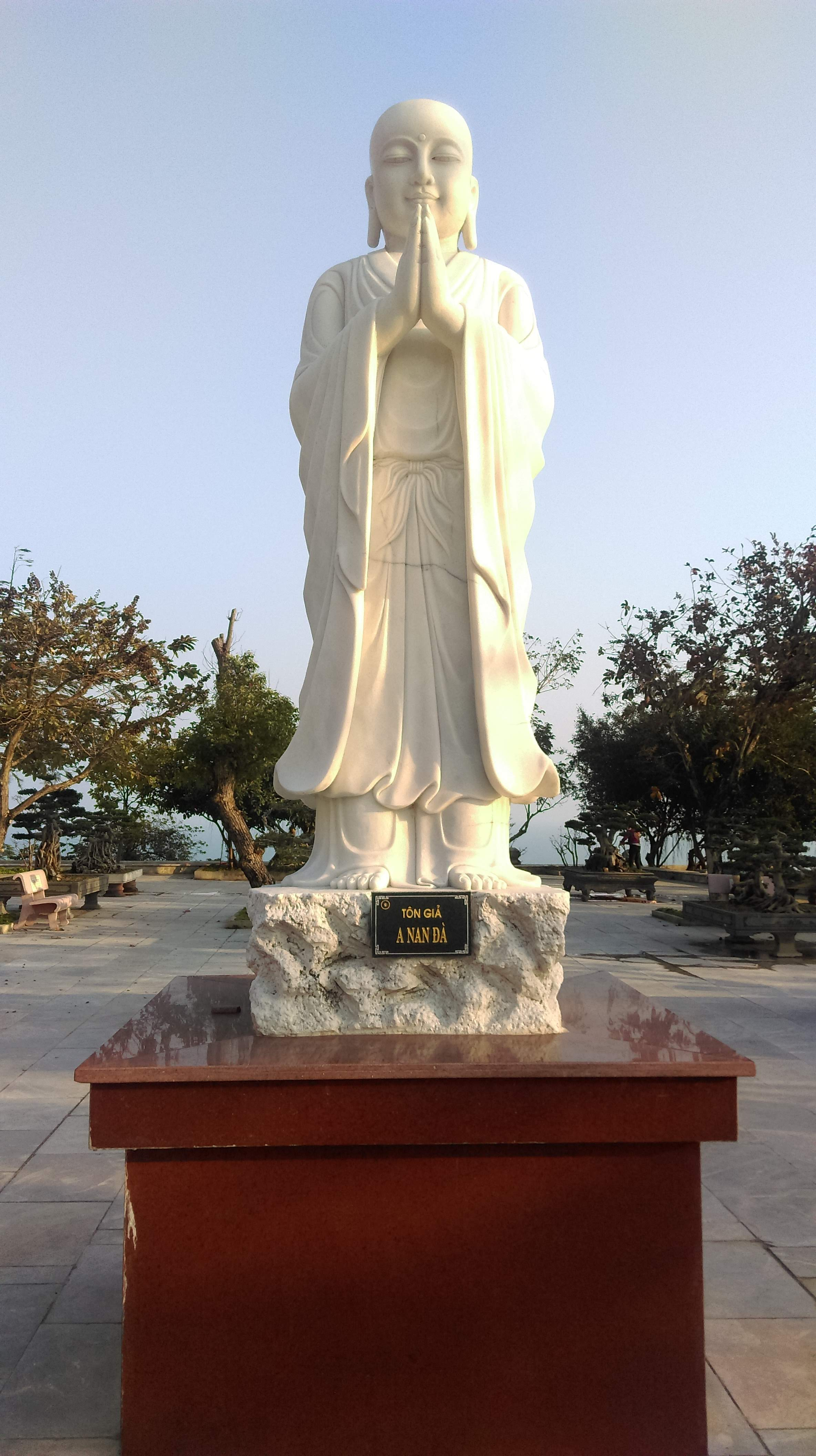 A Nan Đà, chùa Linh Ứng Sơn Trà, Đà Nẵng